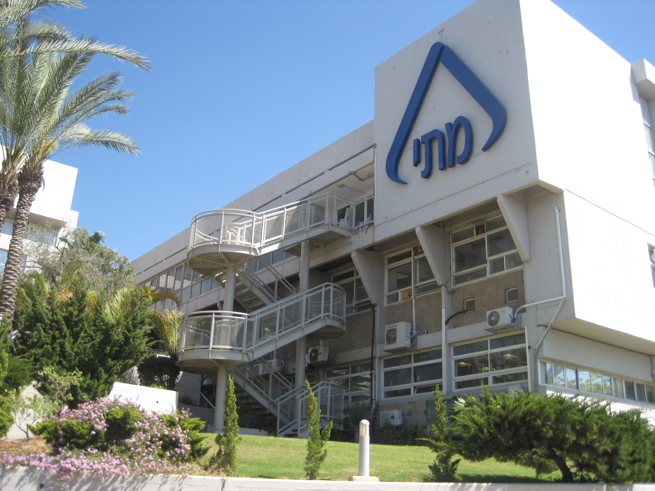 מכון התקנים הישראלי